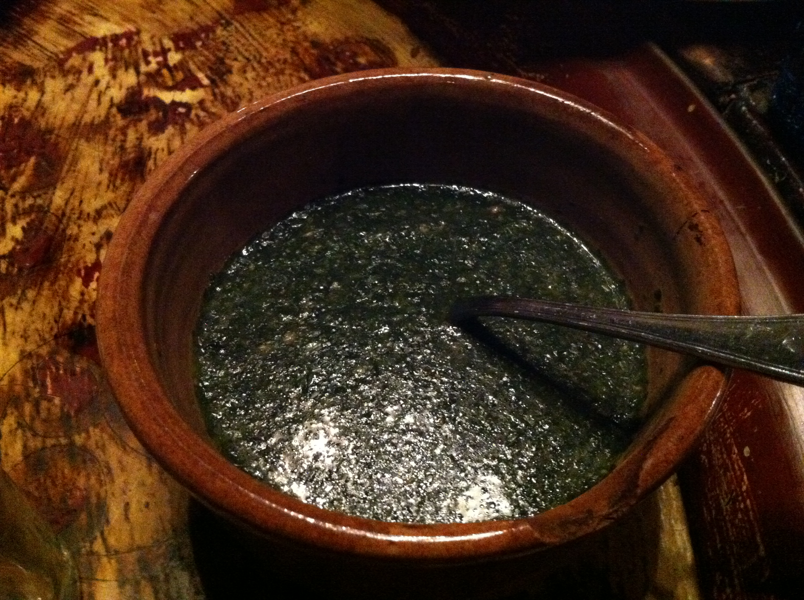 Plat de Molokheya égyptienne.